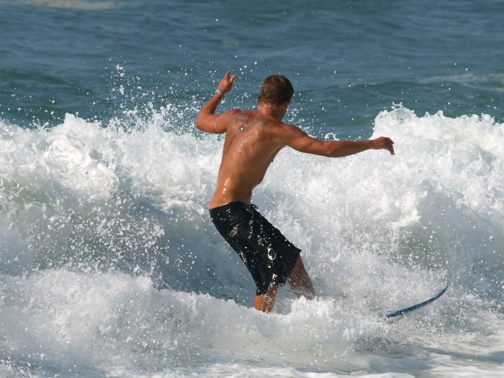 Quicksilver Pro France 2008, Hossegor, France